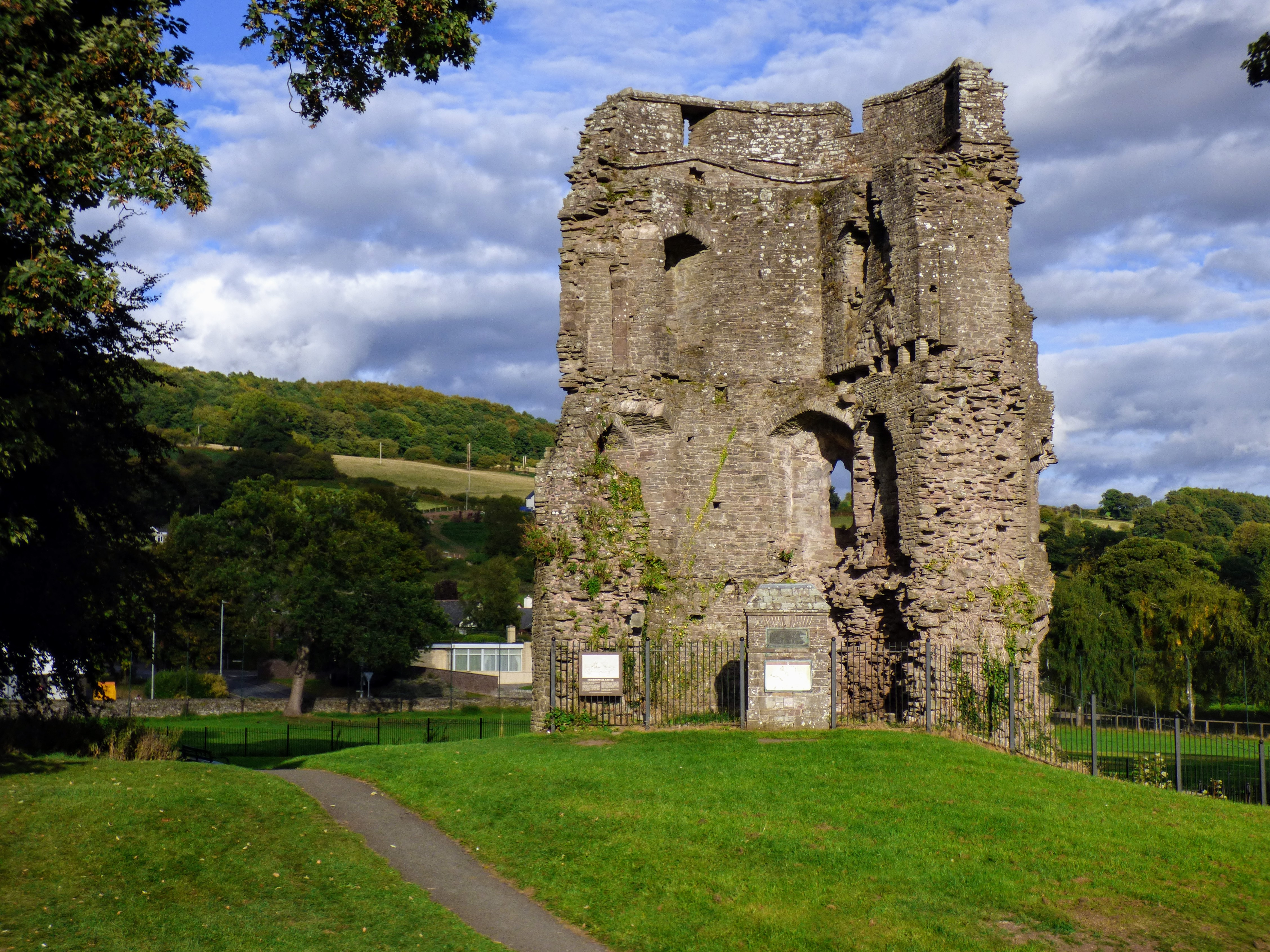 Crickhowell Castle, Wales